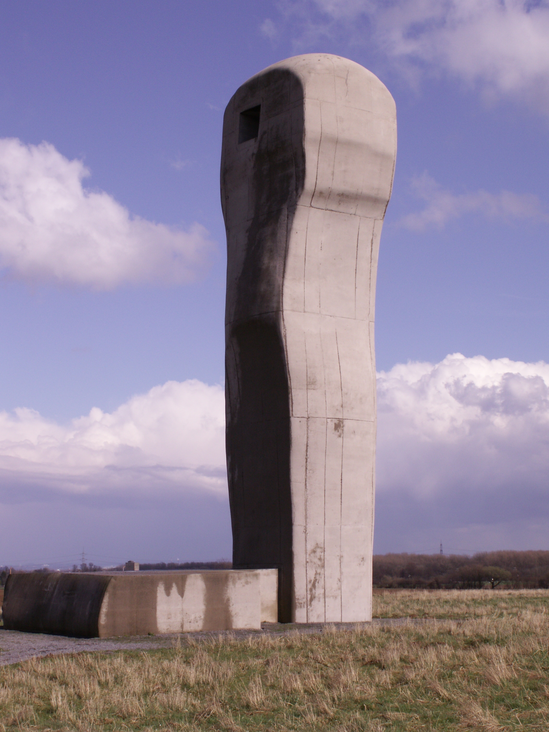 Eduardo Chillida - Begiari (auch:Begirari) Raketenstation Insel Hombroich, Neuss, 2001